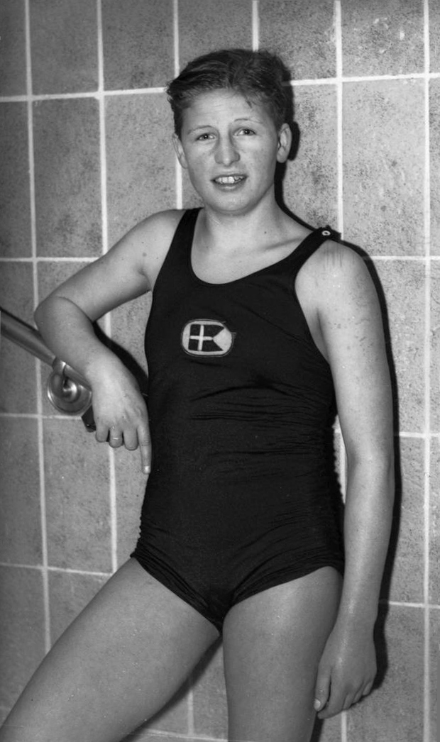 Ragnhild Hveger